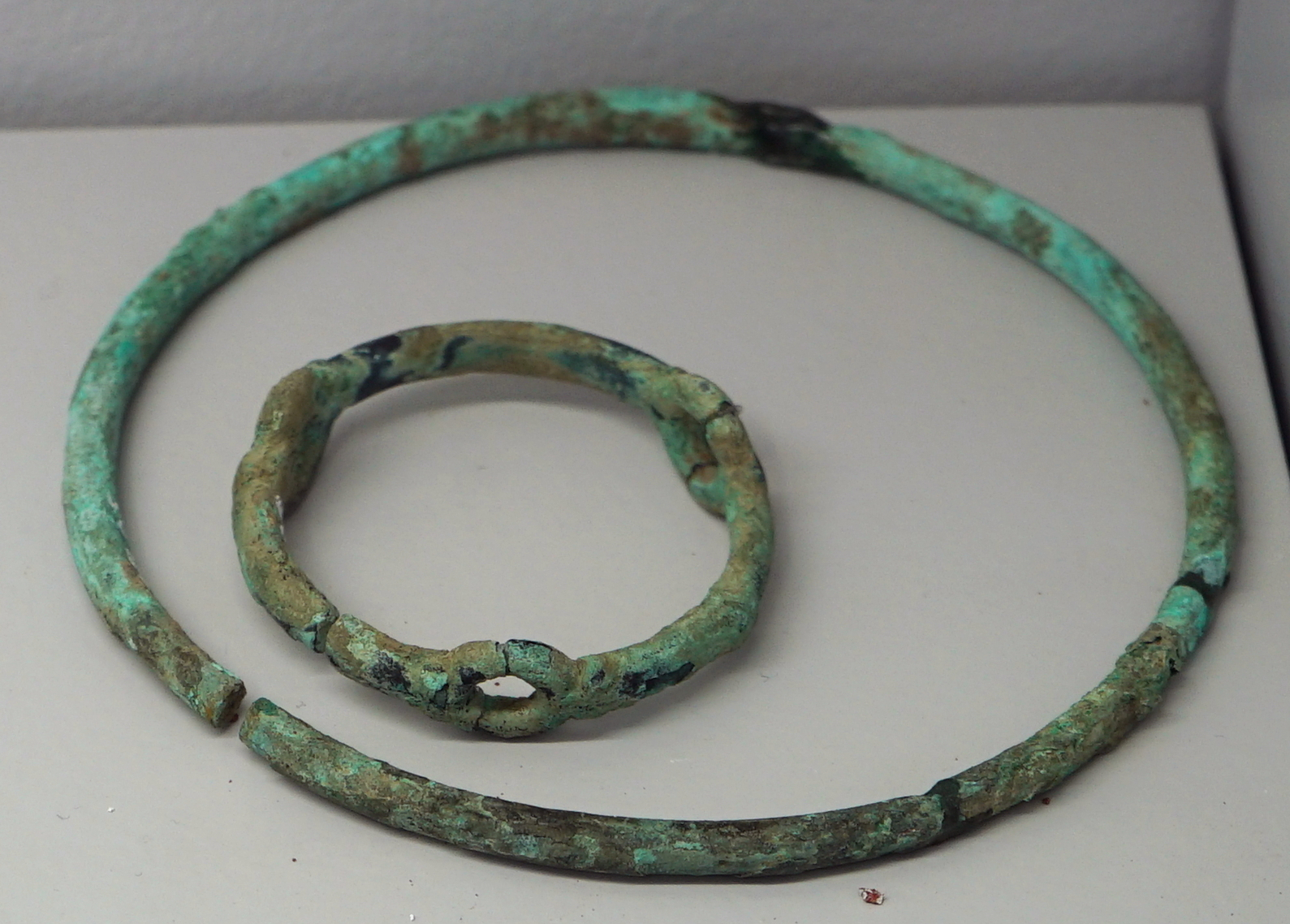 exposé au musée de Toul.